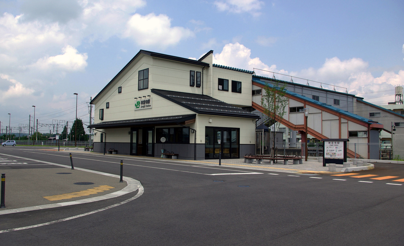 奥羽本線神宮寺駅